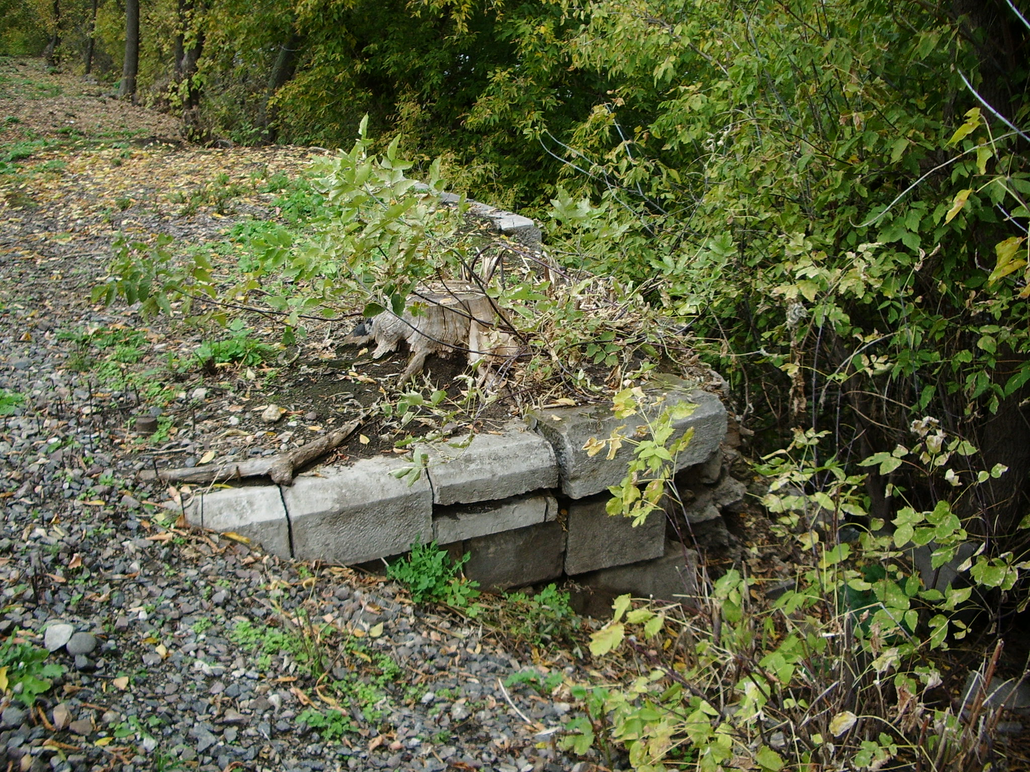 Остатки мостика полустанка Военное поле у железнодорожных путей